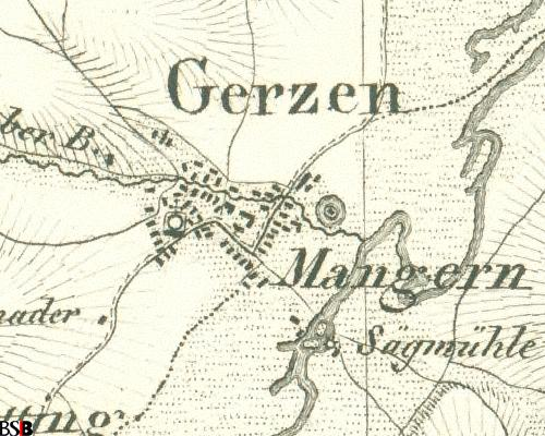 Mangern Markt Gerzen Seemann Topographische Karte Bayern 1835 Burgstall Hofmark